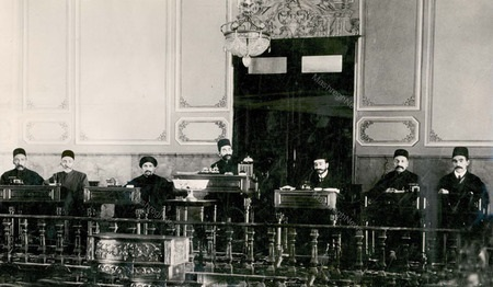 اعضای هیأت رئیسه مجلس شواری ملی دوره دوم